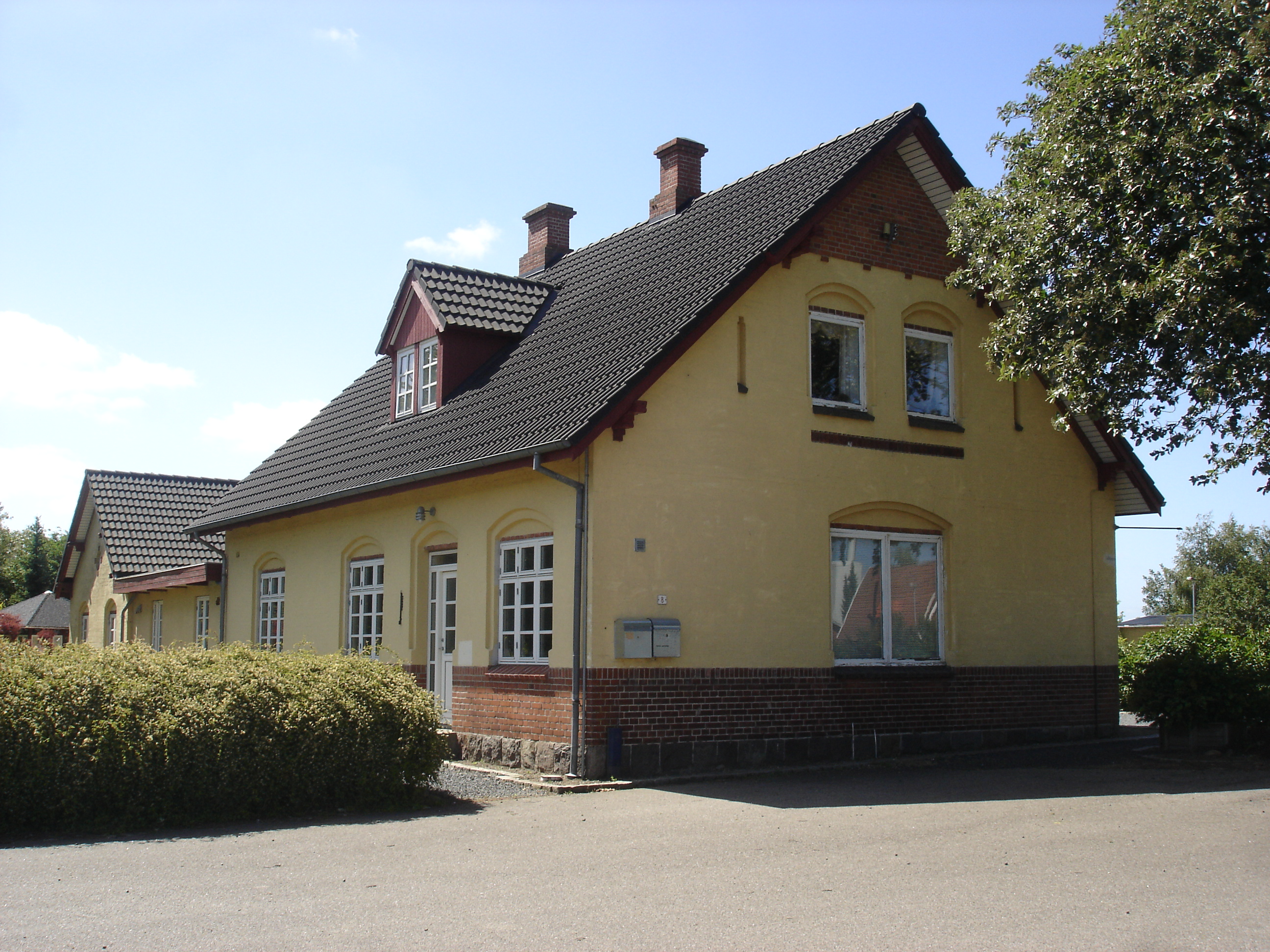 Frederiks Stations hovedbygning fra vejsiden